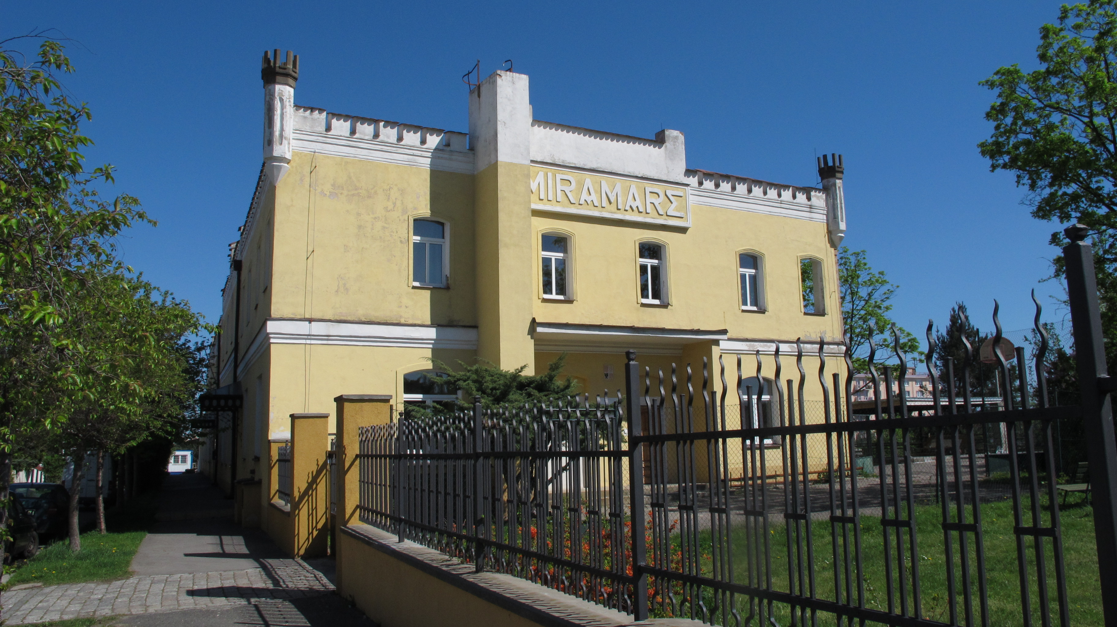 MIRAMARΣ